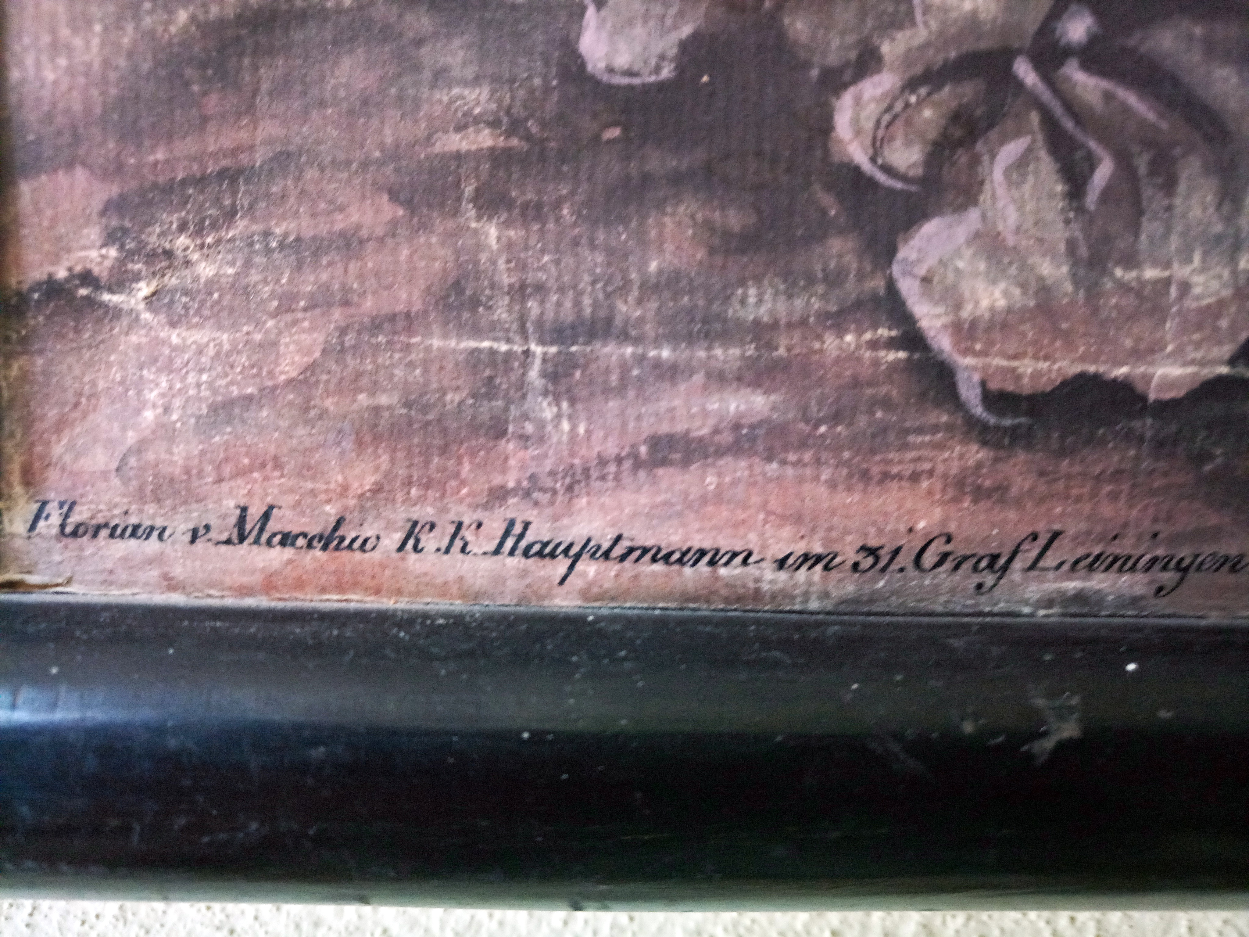 Signatur Leininger Stammbaum Altes Rathaus Grünstadt, gefertigt Florian von Macchio, 1830